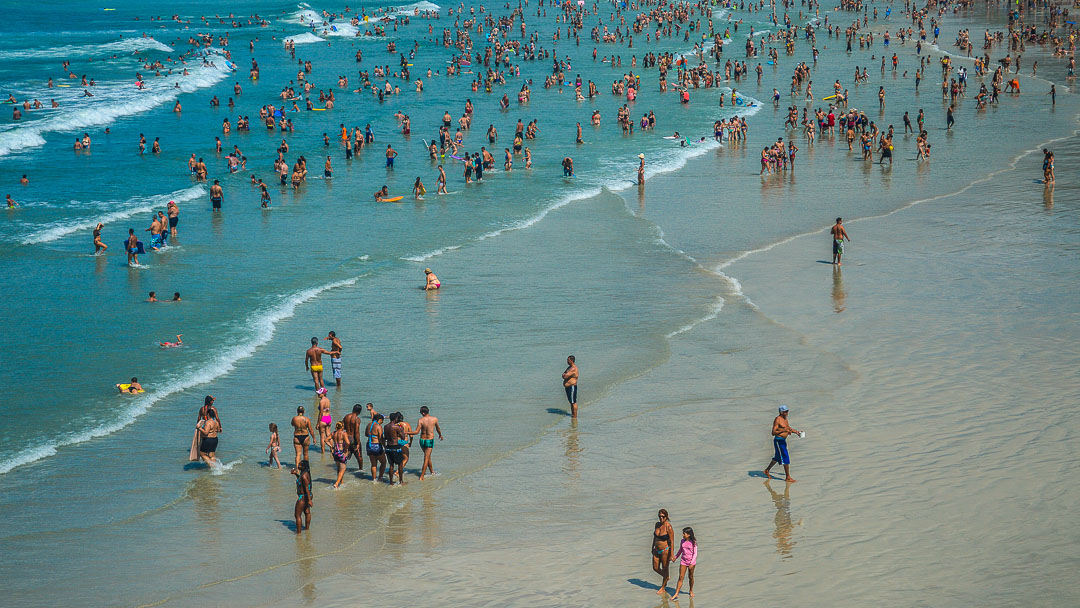 Vista da Praia Grande a partir do extremo esquerdo da praia.